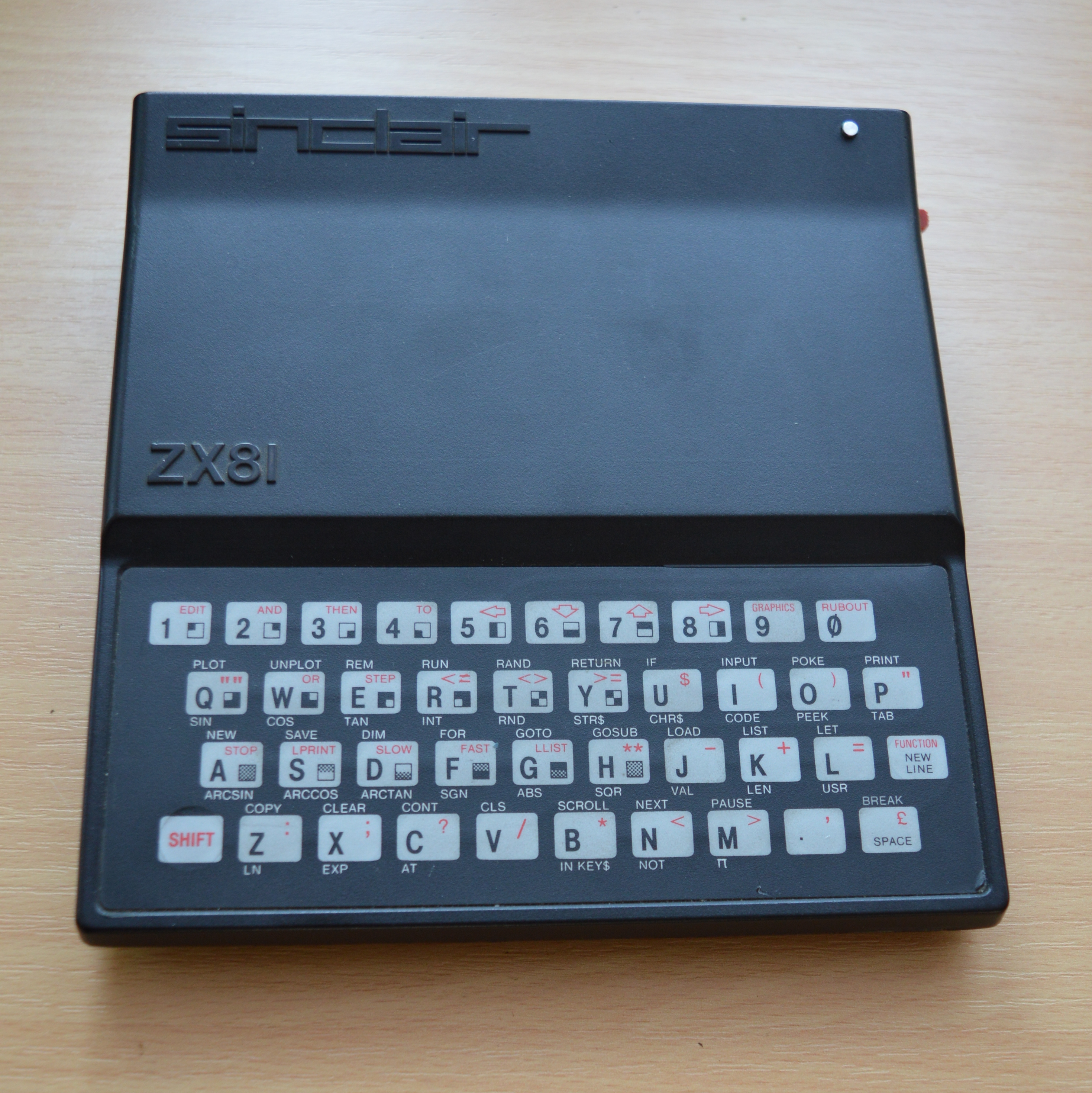 Mikrokomputer ZX81